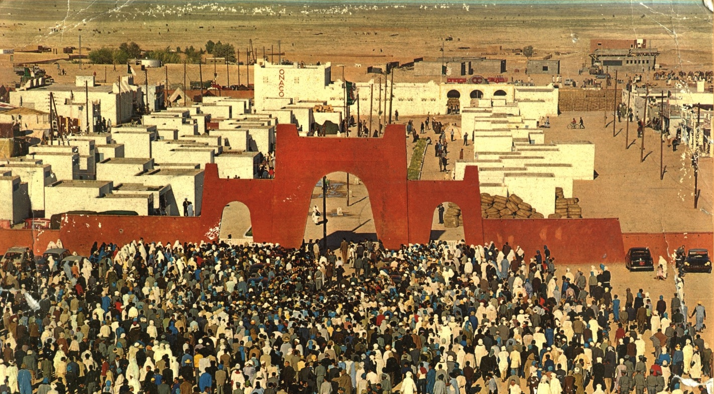 Le Mouggar (années 1970)